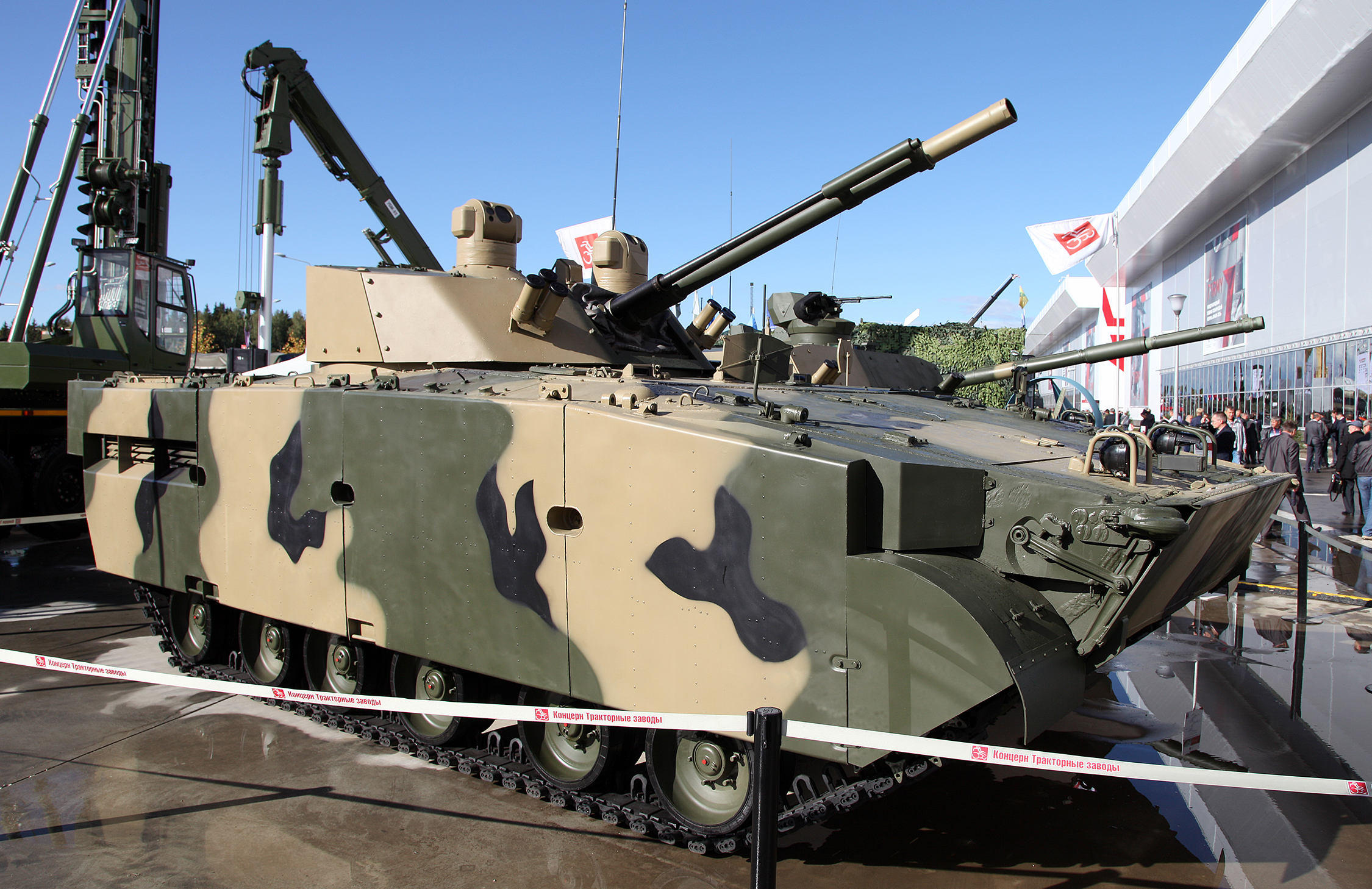 БМП-3М Драгун с боевым модулем БМ 100+30 (BMP-3M Dragun with BM 100+30 turret system)